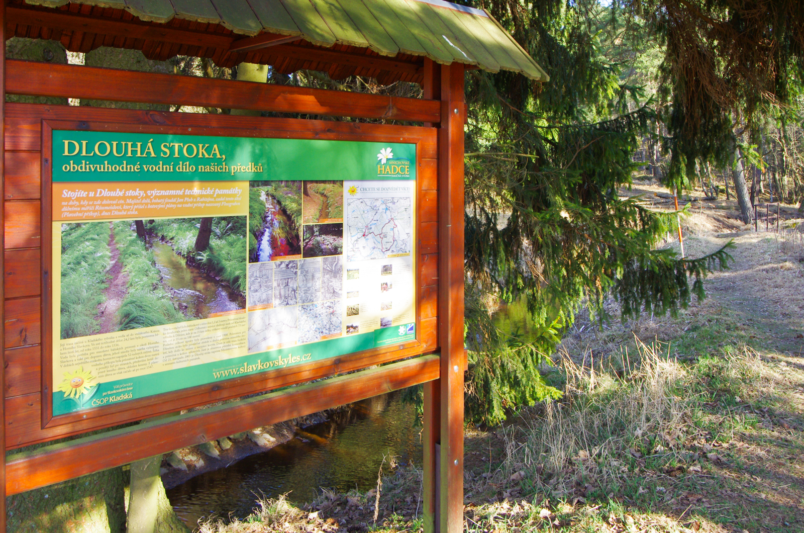 Dlouhá stoka, Slavkovský les, okres Cheb